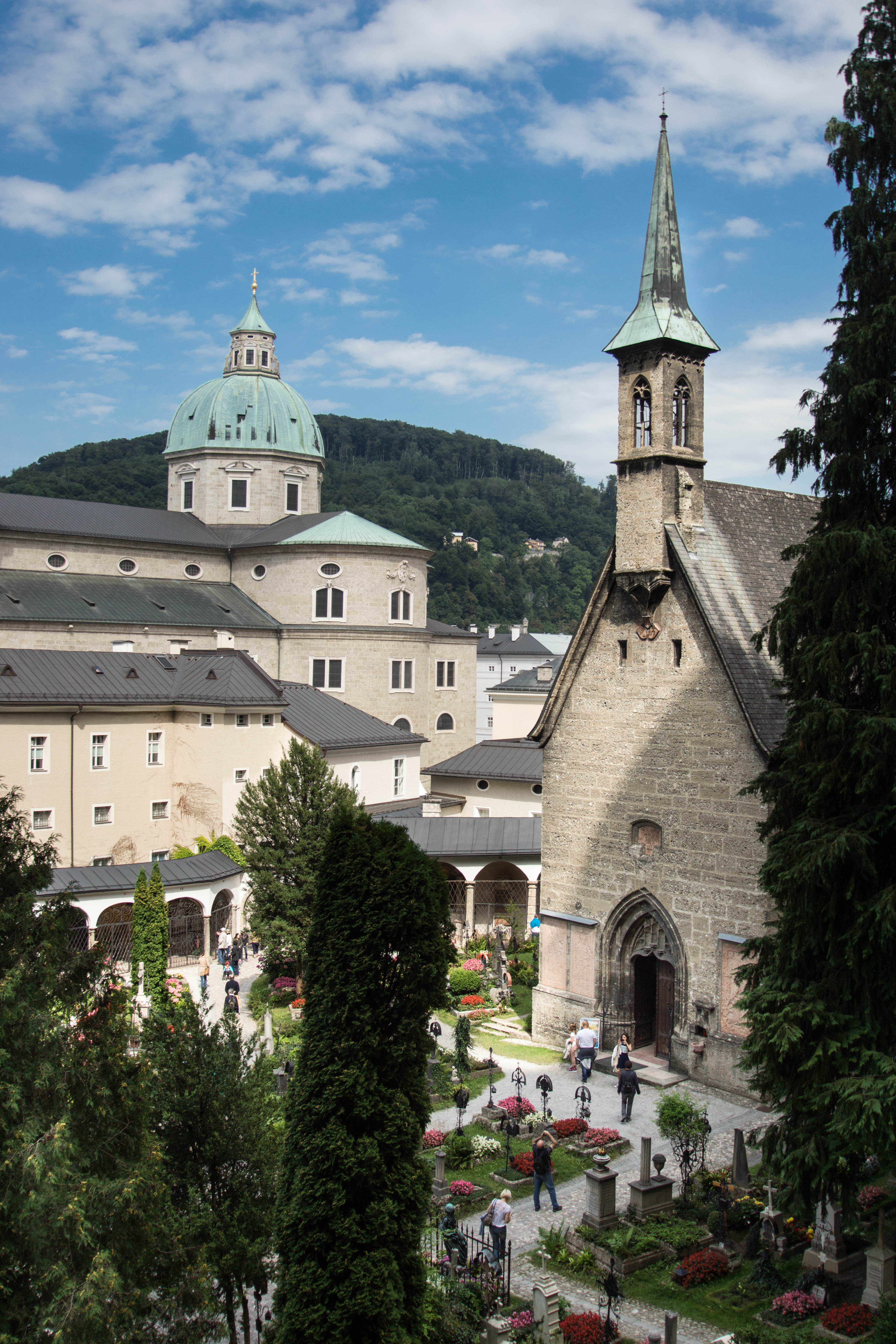 Capilla de Santa Margarita en la Abadía de San Pedro